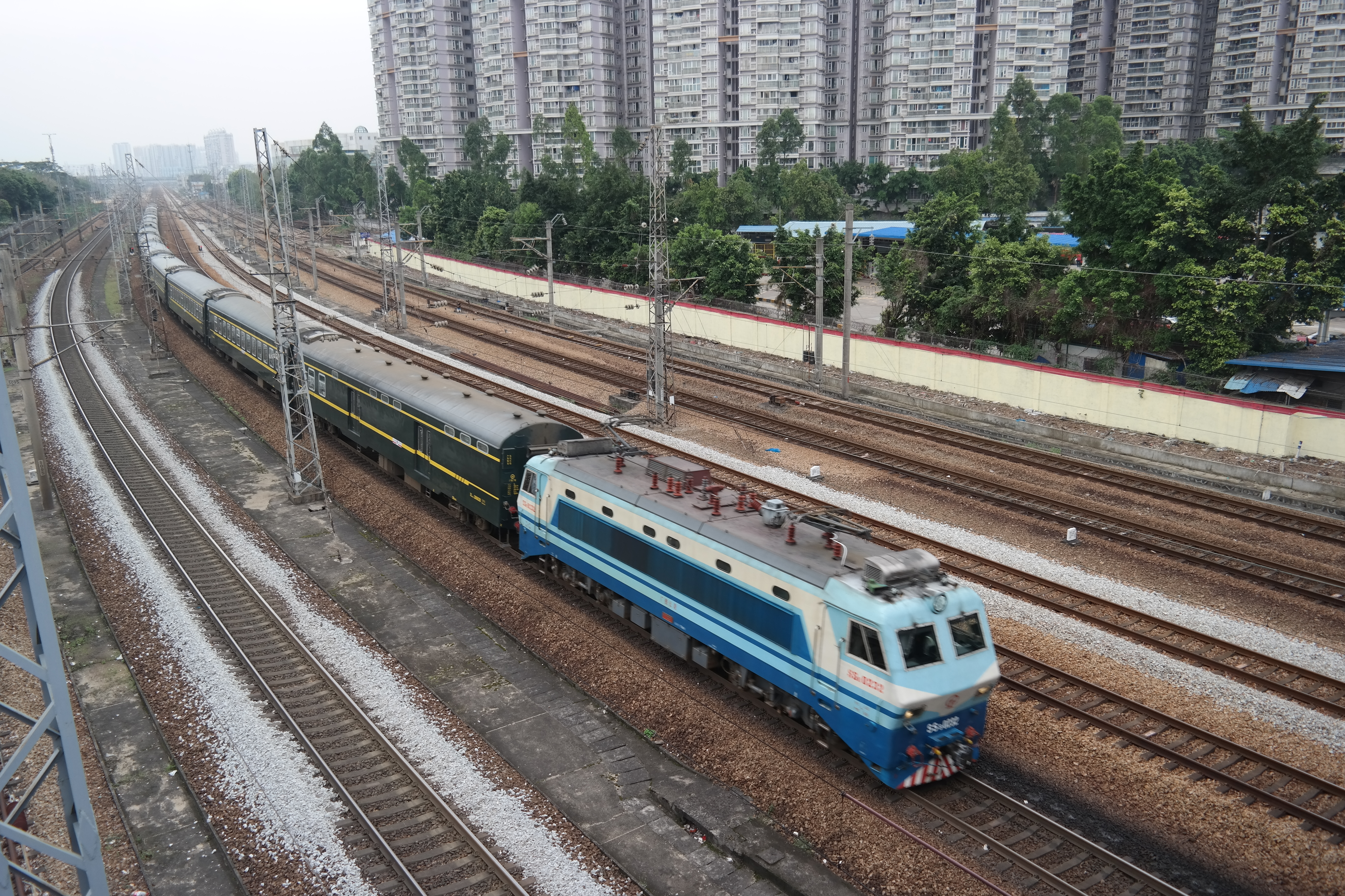 中文（中国大陆）: 广园快速路人行天桥上拍车